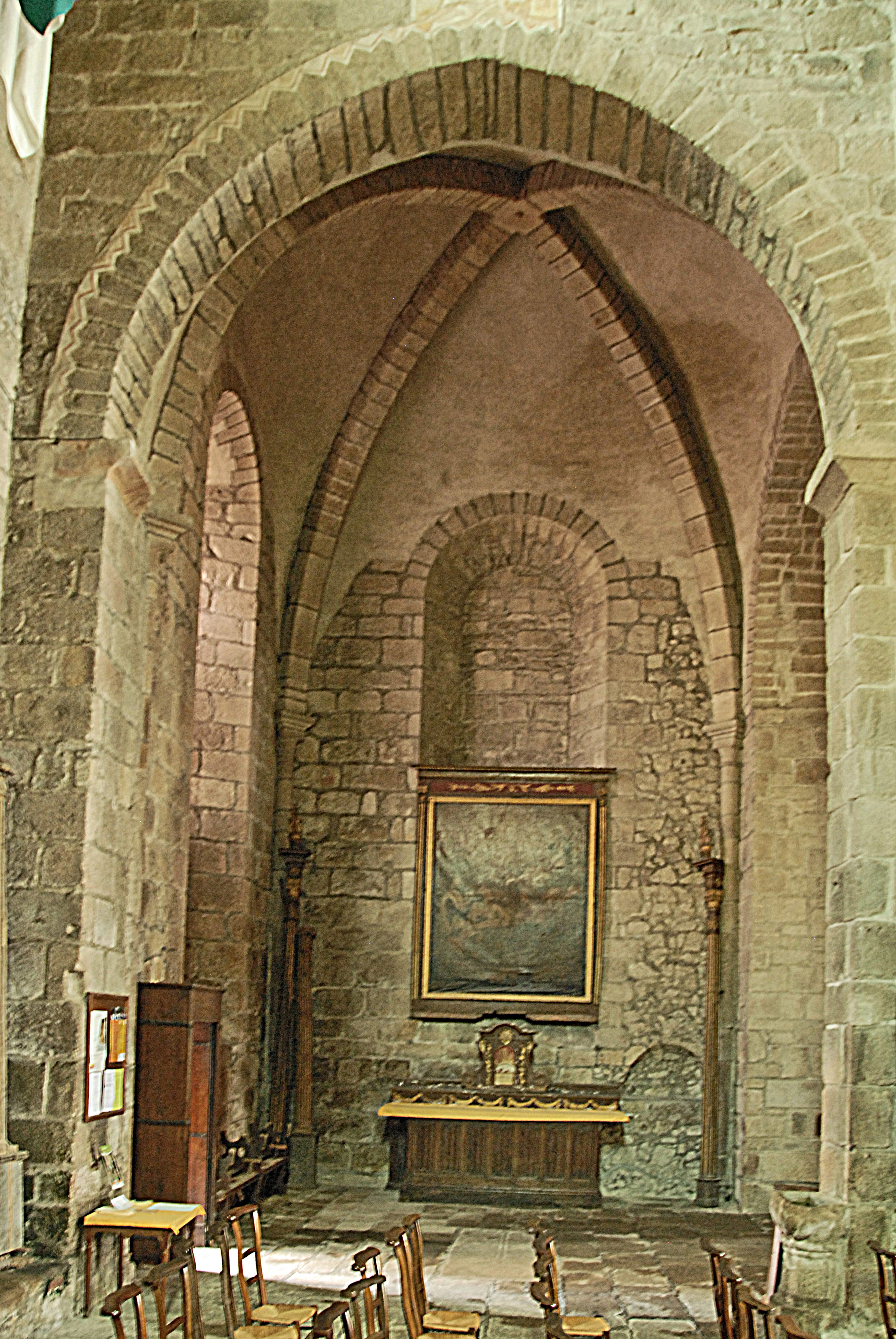 St-Junien, nördl. Querhauskapelle